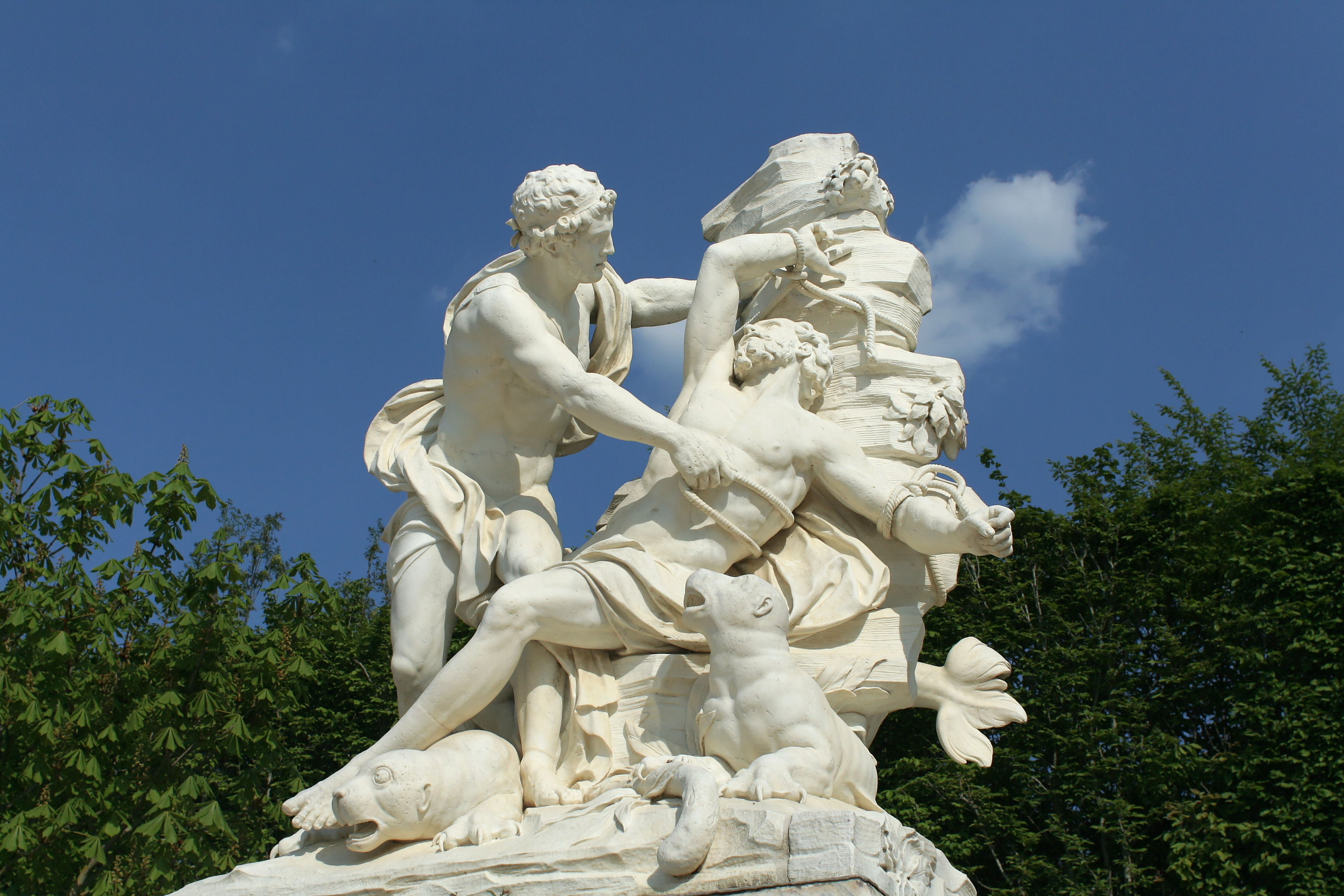 Aristée attachant le dieu marin Protée à un rocher pour le forcer à lui dévoiler son avenir.